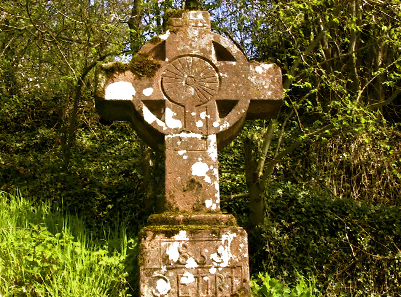 La croix de Falguières. Pomayrols (Aveyron-France)